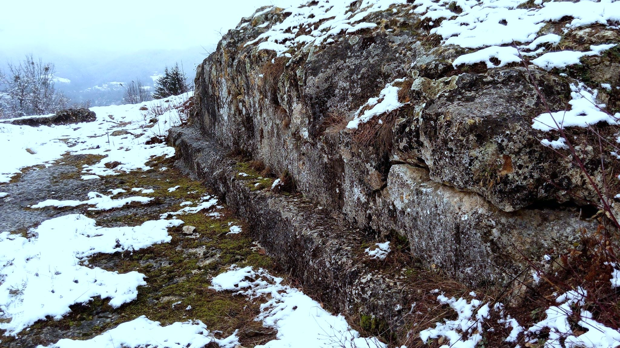 Kripta u selu Rataji kod Miljevine (Foča) - arheološko područje Rataje.